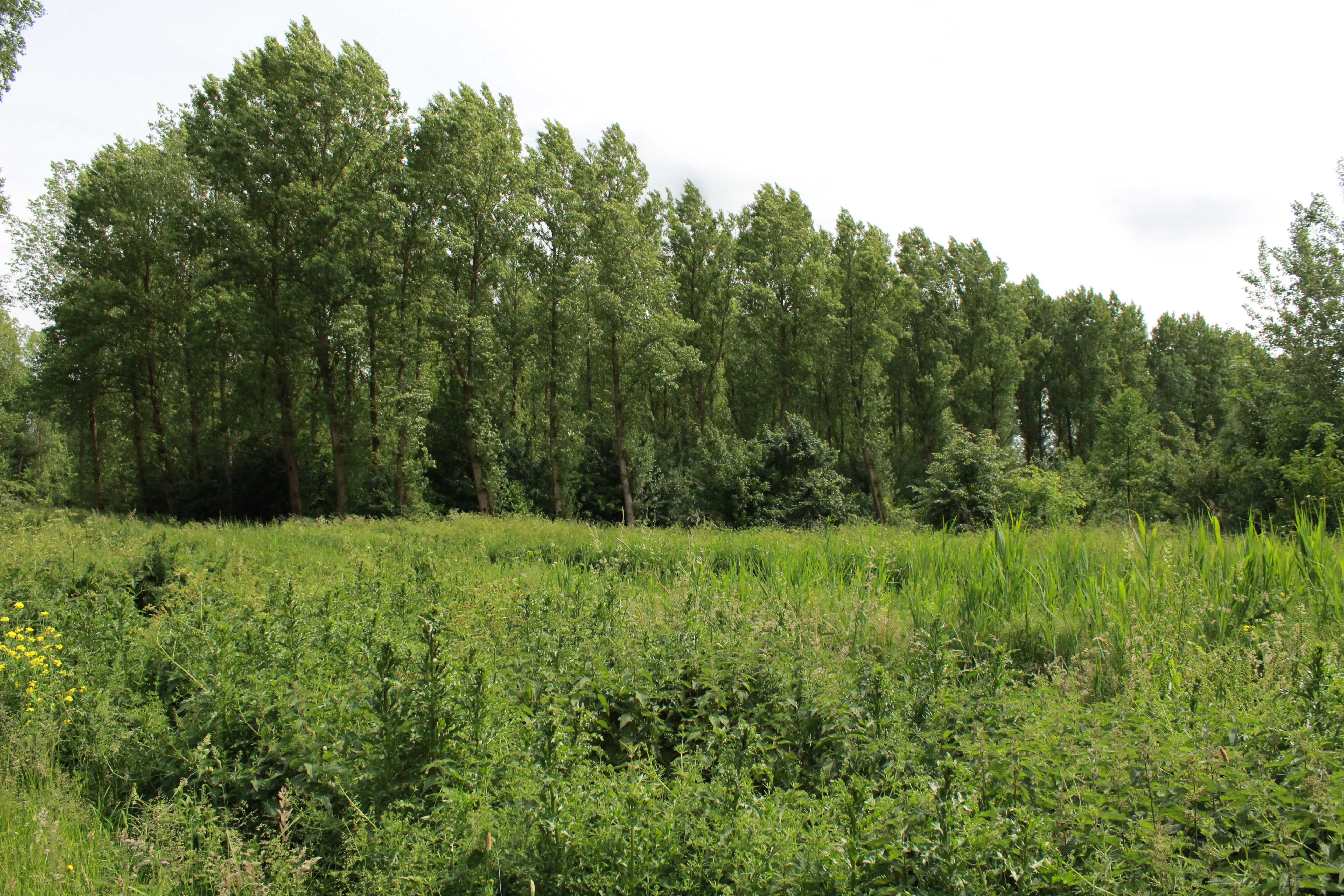 De populieren staan in rechte lijnen, maar dit wordt nu aangepakt door Staatsbosbeheer